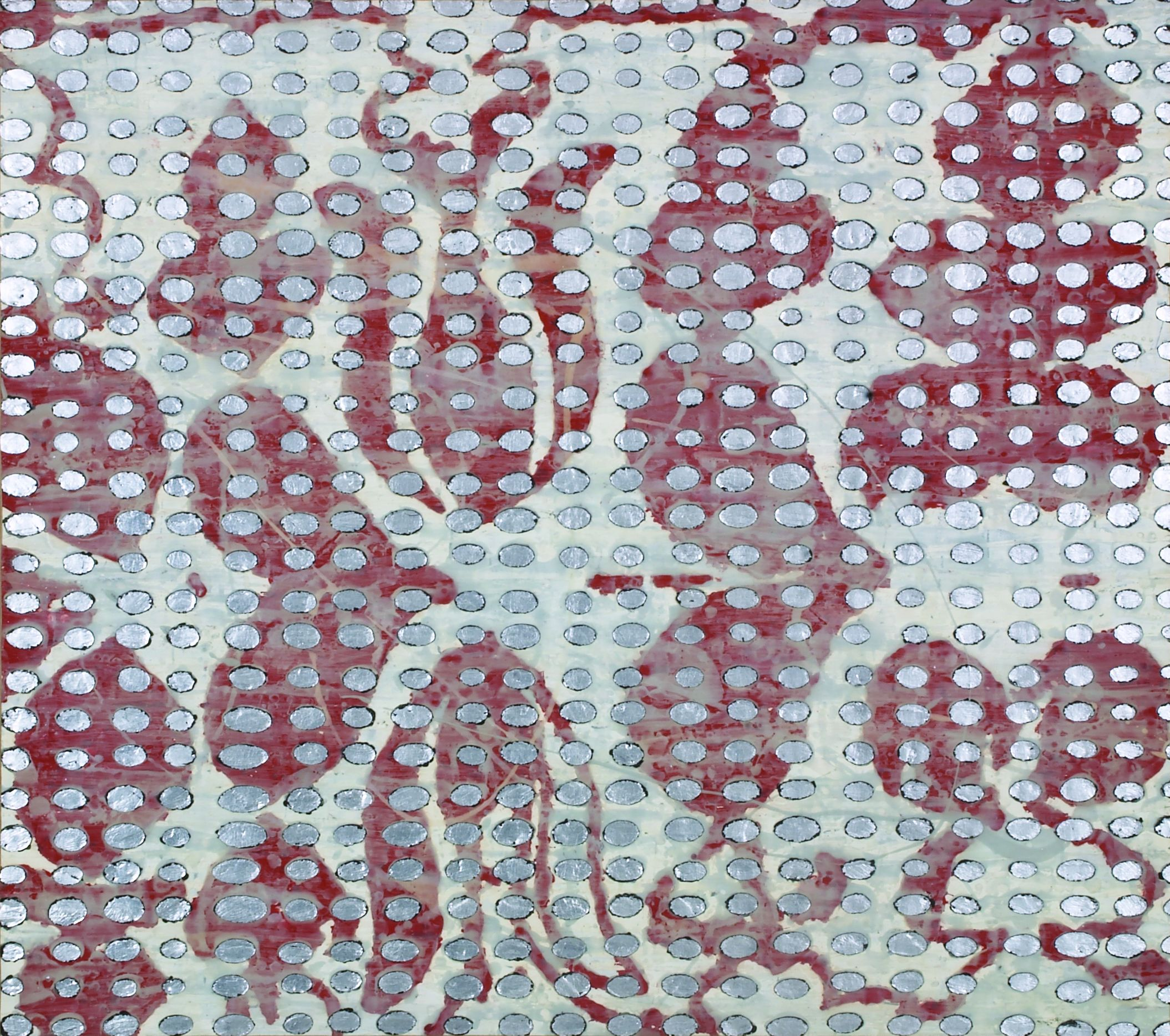 Mulasics László - Fényszövetek között enkausztika, ezüstfólia, vászon 80x90cm 1999